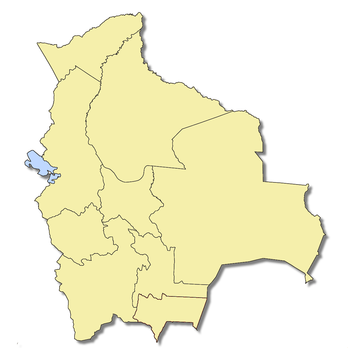 Bolivia Locator Map